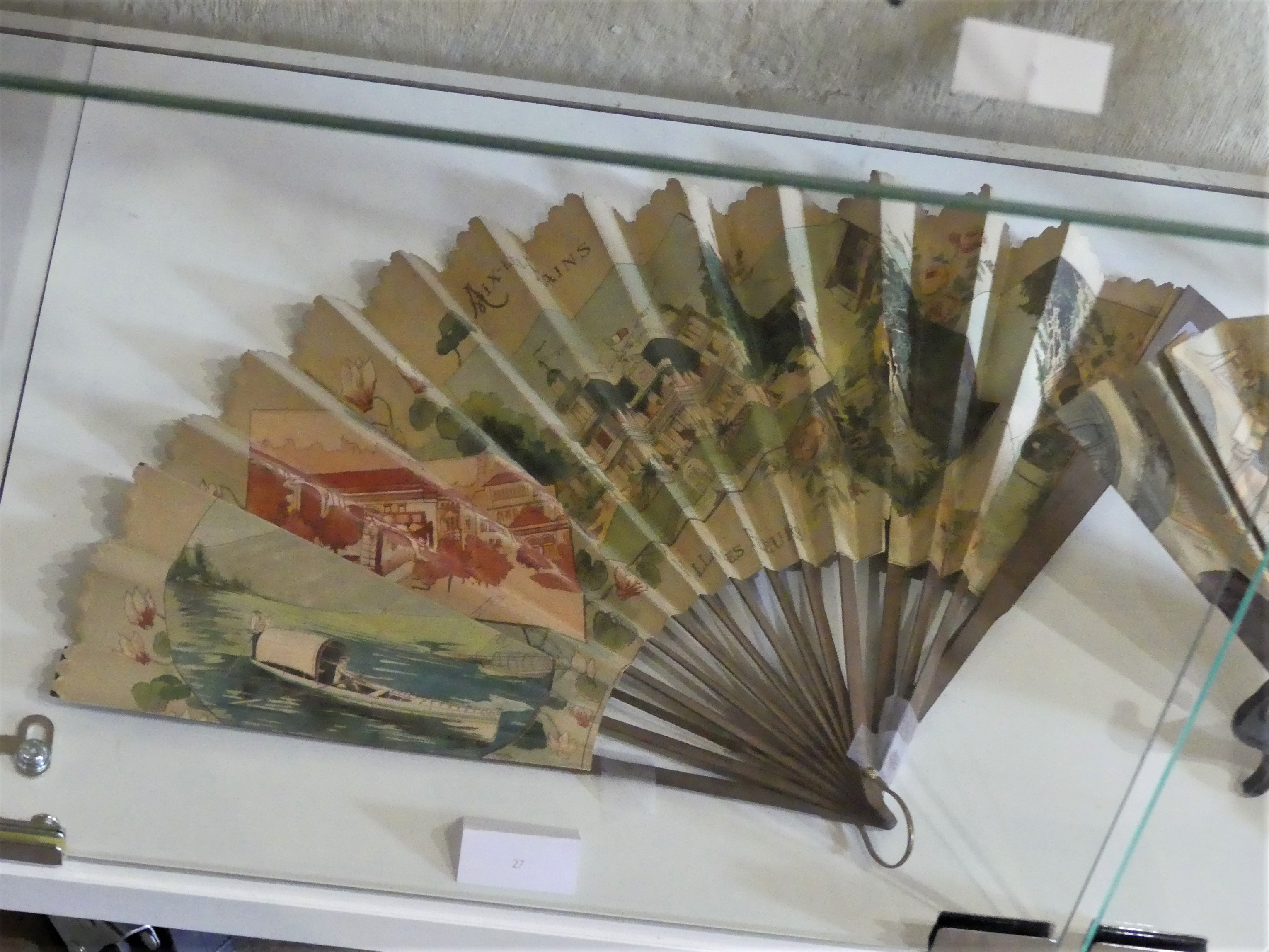 Éventail publicitaire de 1910 pour les thermes d'Aix-les-Bains, exposition d'éventails à la papeterie de Vaux, Payzac, Dordogne, France.